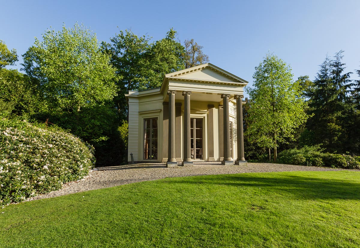 Tuinhuis, later genoemd Het Capitool, Schaep en Burgh, 's-Graveland, Wijdemeren, Noord Holland, Nederland.